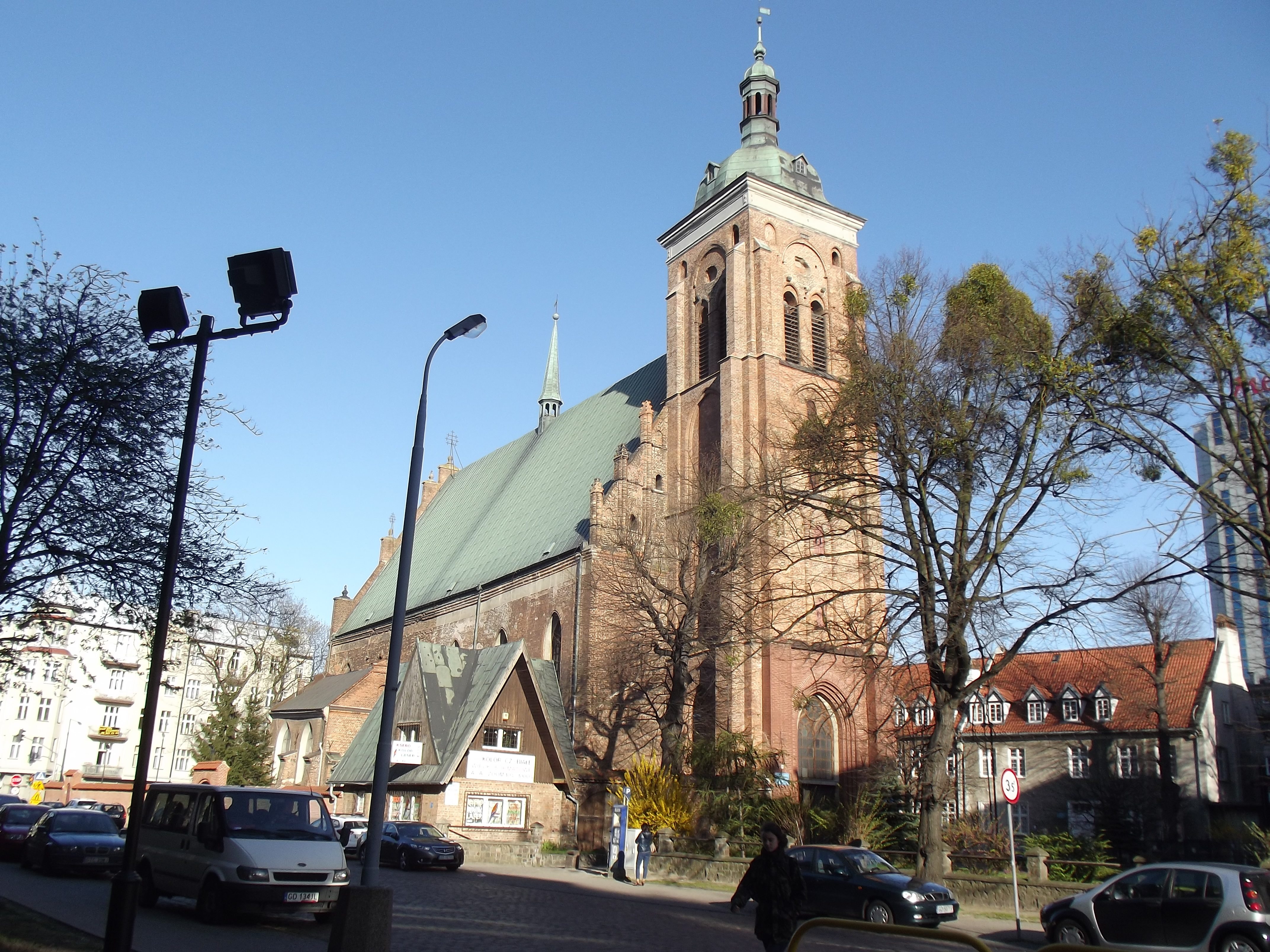 Gdańsk Stare Miasto, ul. Zaułek św. Bartłomieja 1 - Konkatedra greckokatolicka św. Bartłomieja i Opieki Najświętszej Bogurodzicy, 1486-1494, po 1945 (widok od ul. Gnilnej)